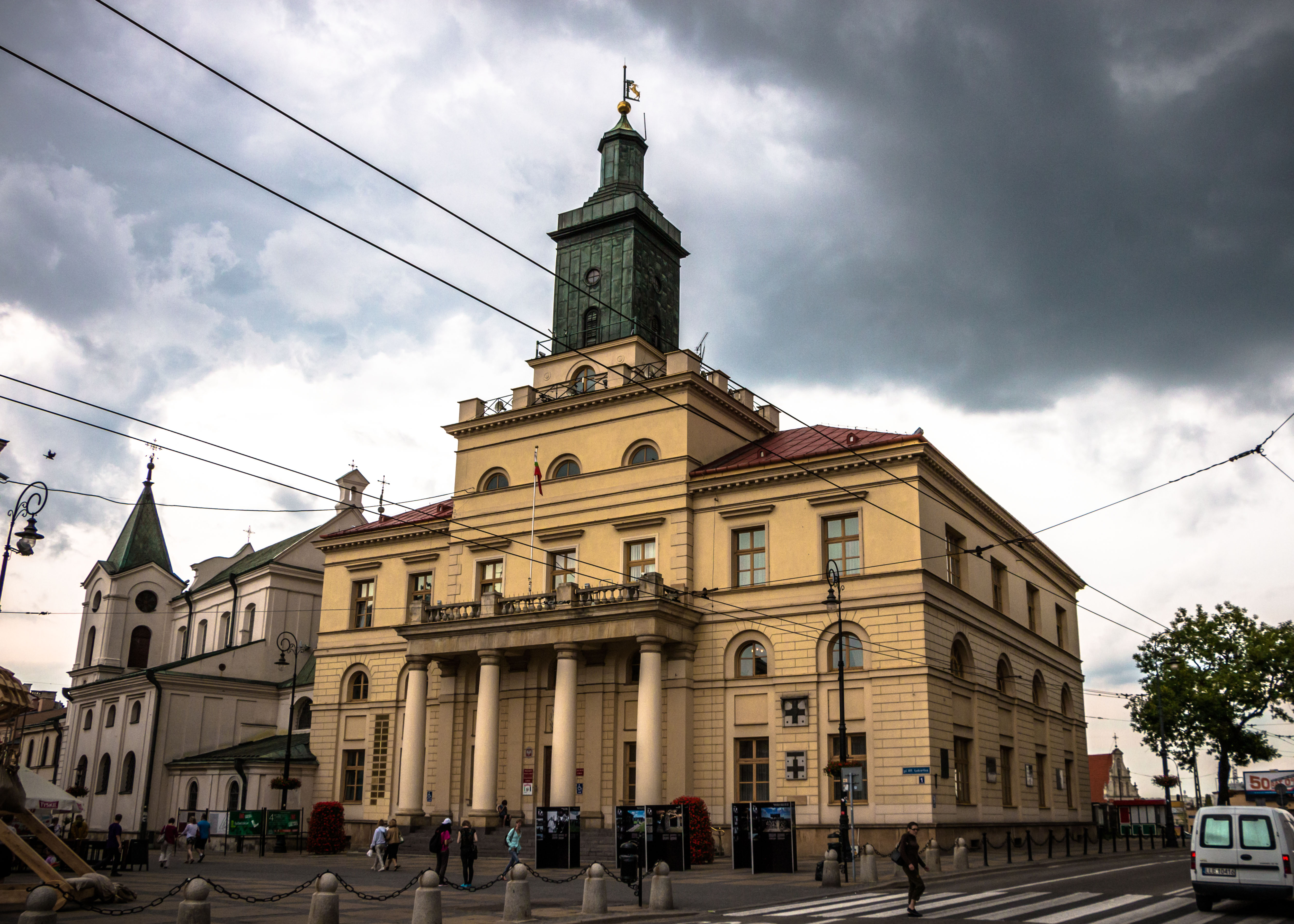 Lublin, nowy ratusz, XVII, 1827-1828